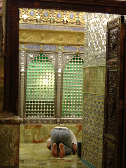 Man prostrating during prayers at Imamzadeh Saleh shrine, Tehran